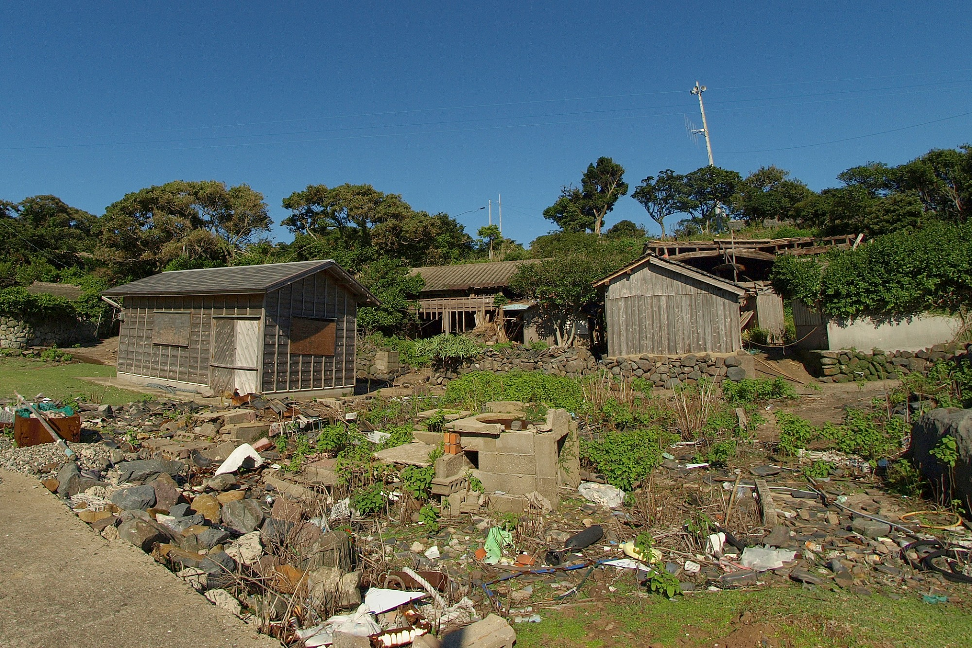 長崎県小値賀町野崎島の野崎集落。現在は無人となっている。